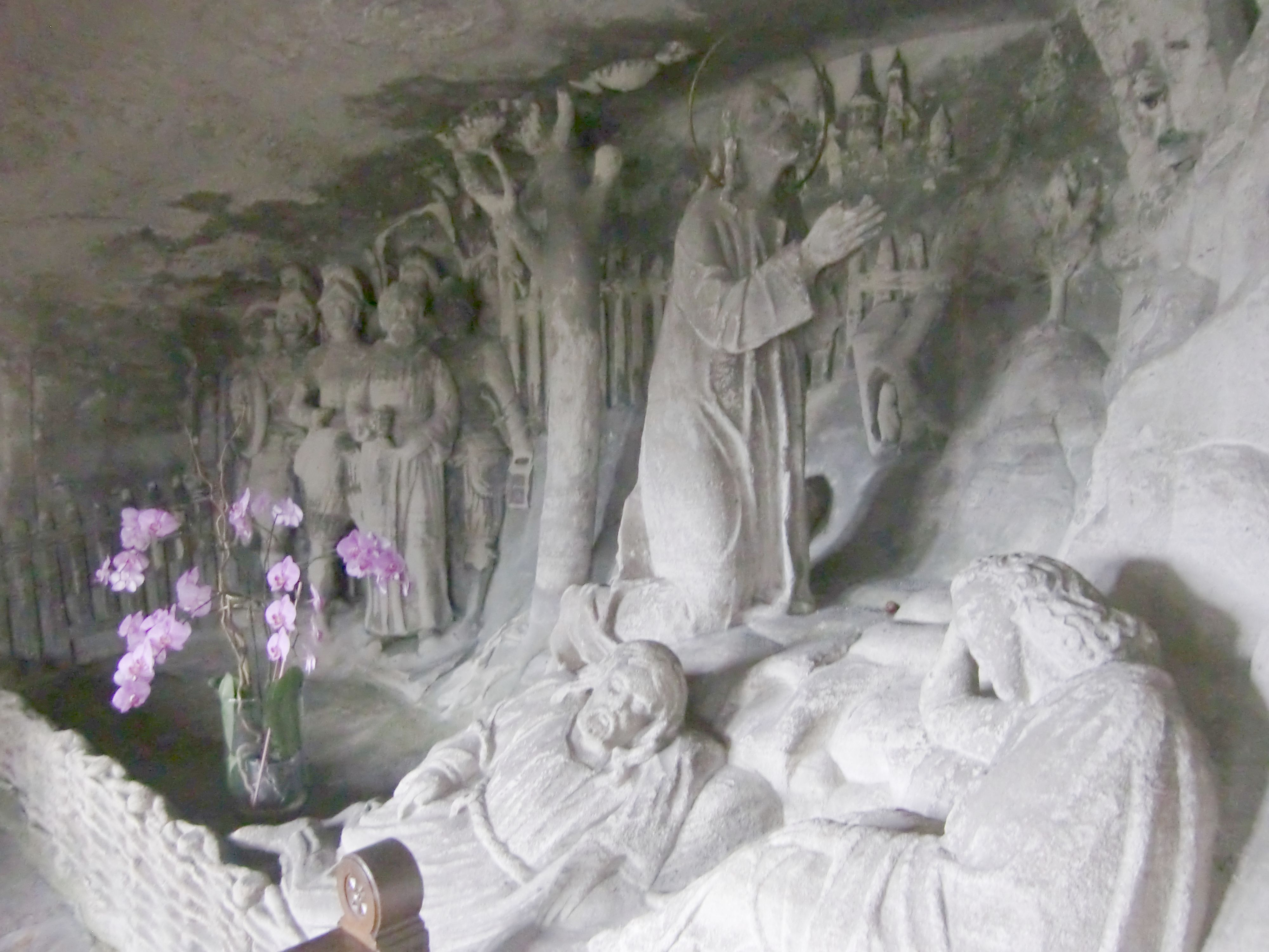 Ölberg-Szene von Caspar Vogt (1584-1644) in St. Salvator in Schwäbisch Gmünd. Obere Kapelle